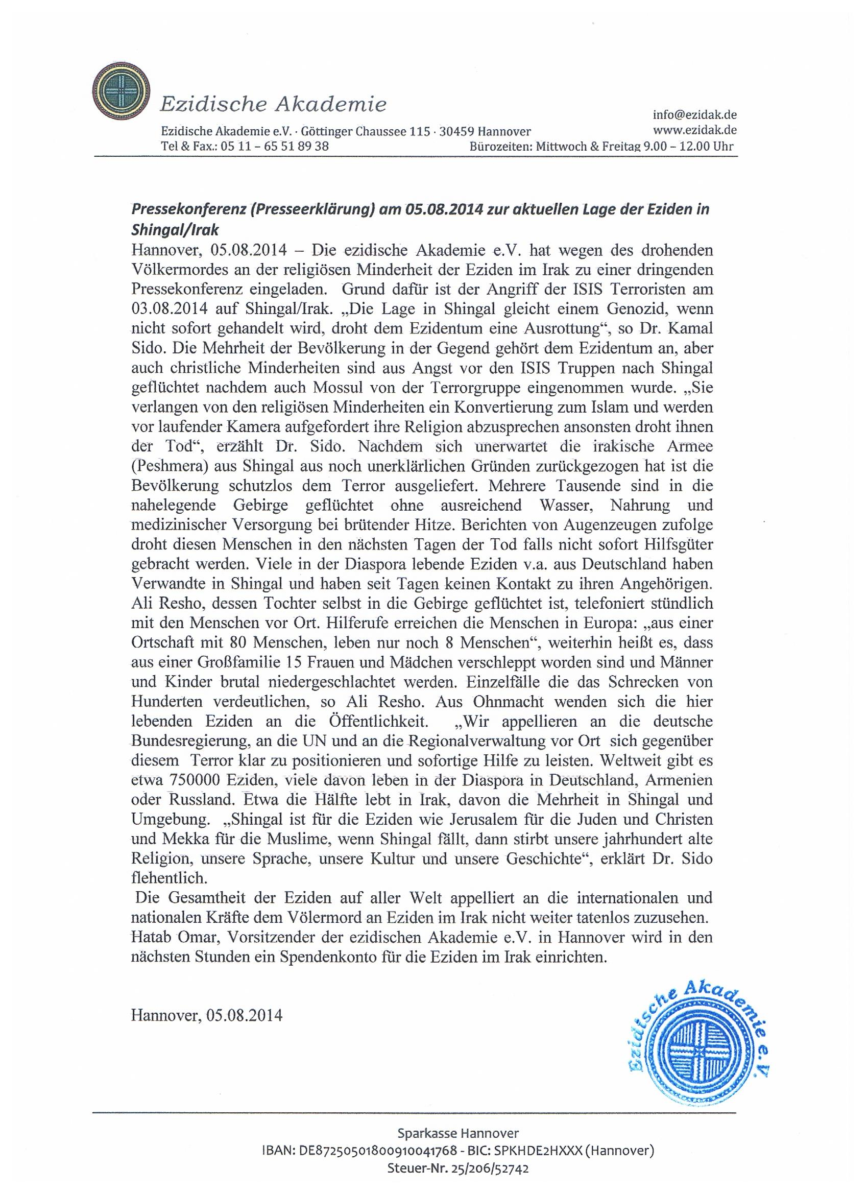 Presseerklärung der Ezidischen Akademie und der Gesellschaft für bedrohte Völker zur aktuellen Lage der Eziden im Irak ...